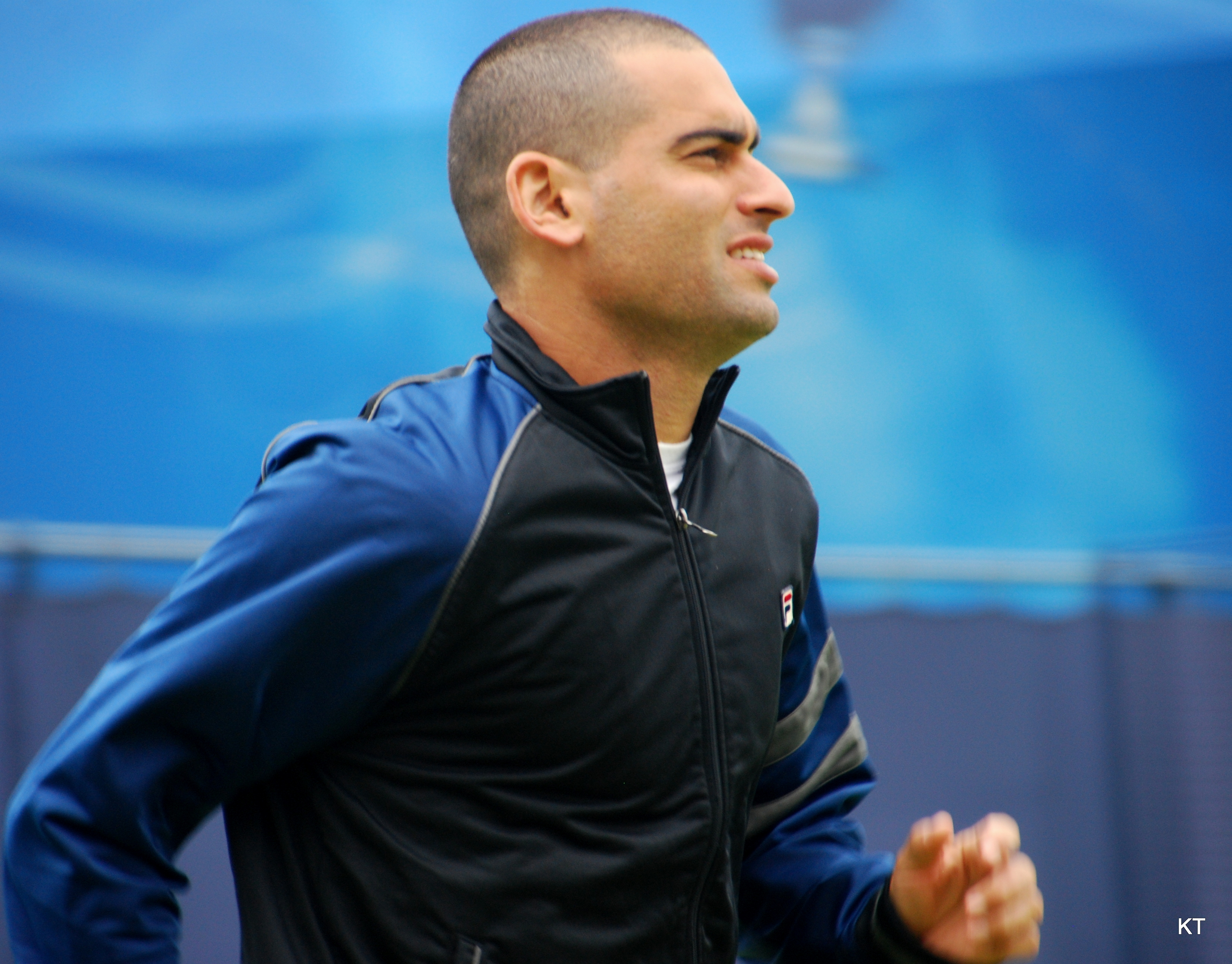 Andy Ram